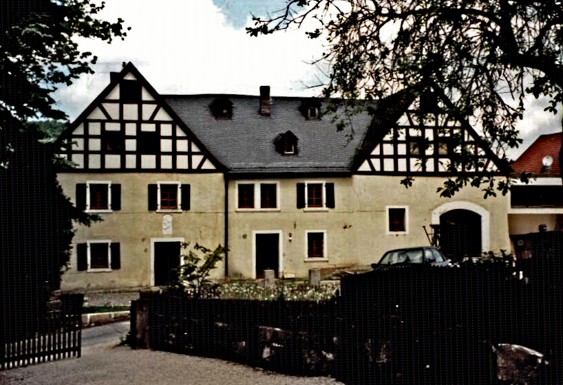 Rittergut Mengersdorf (bei Mistelgau, Oberfranken), ehemaliges Gesindehaus, jetzt Gasthaus